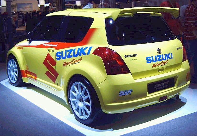 Der Suzuki Swift 1600 selbst fotografiert auf der AMI 2005.